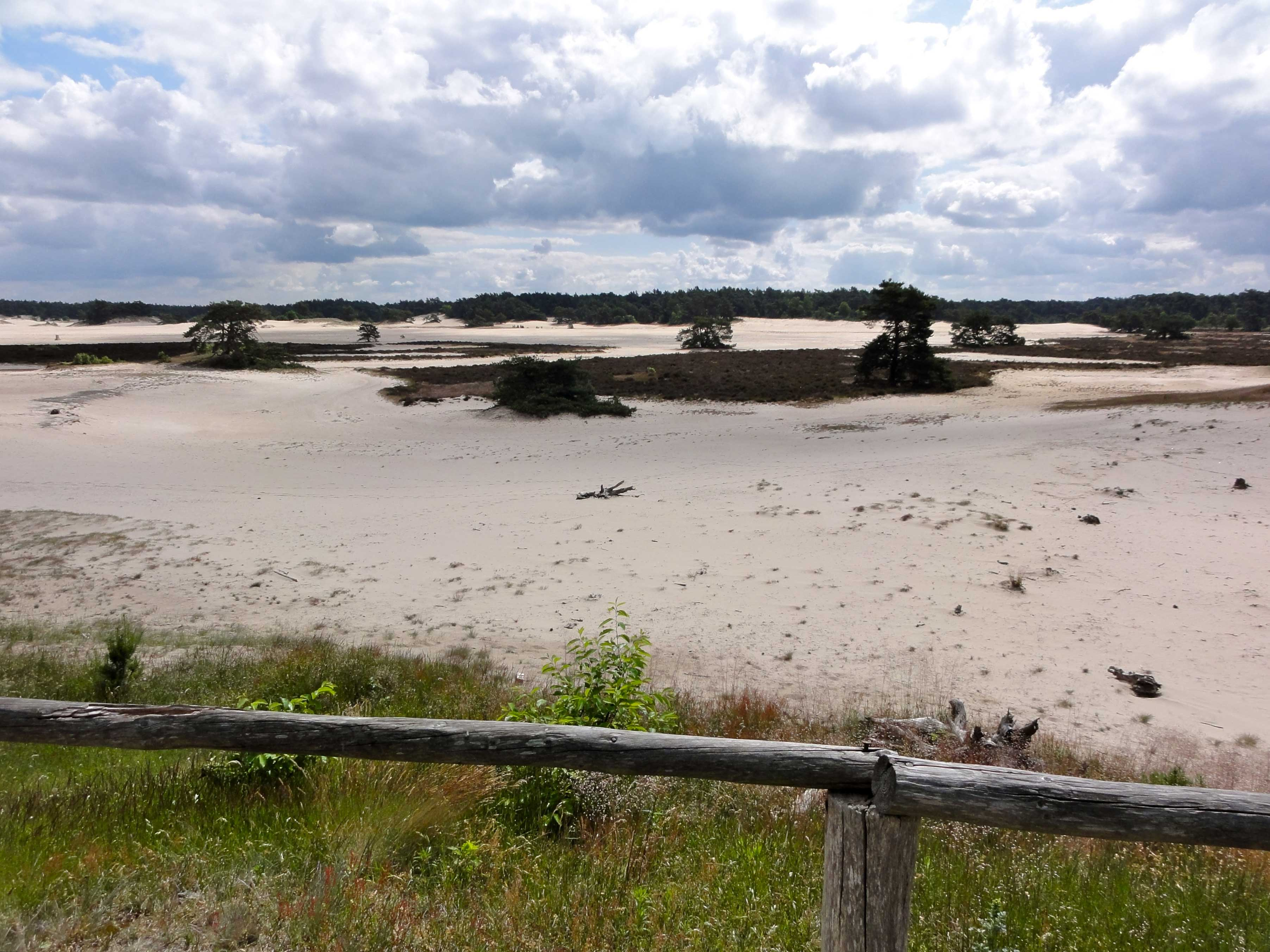 Hulshorsterzand